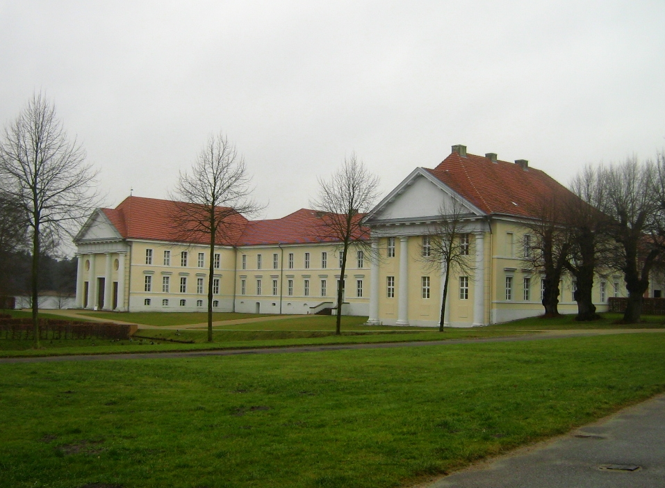 Kavalierhaus beim Schloss Rheinsberg in Rheinsberg (Landkreis Ostprignitz-Ruppin, Brandenburg).